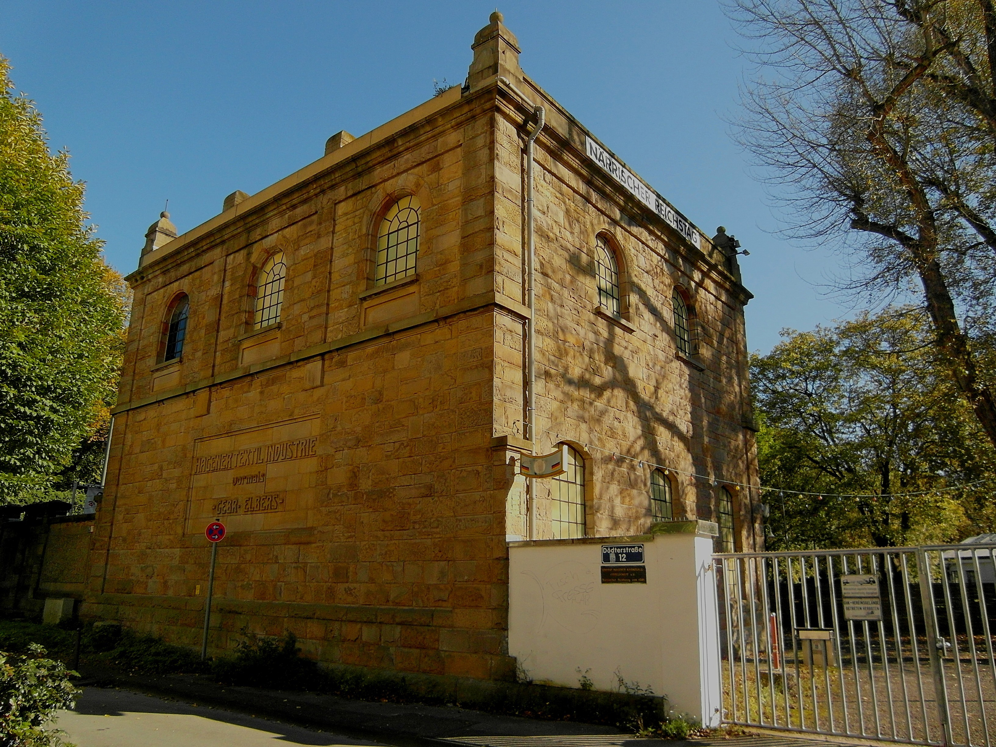 Ehemaliges Turbinenhaus der Fa. Elbers, Dödterstr. 12, Hagen, jetzt Räumlichkeit der Großen Hagener Karnevalsgesellschaft e.V., „Närrischer Reichstag“ This is a photograph of an architectural monument.